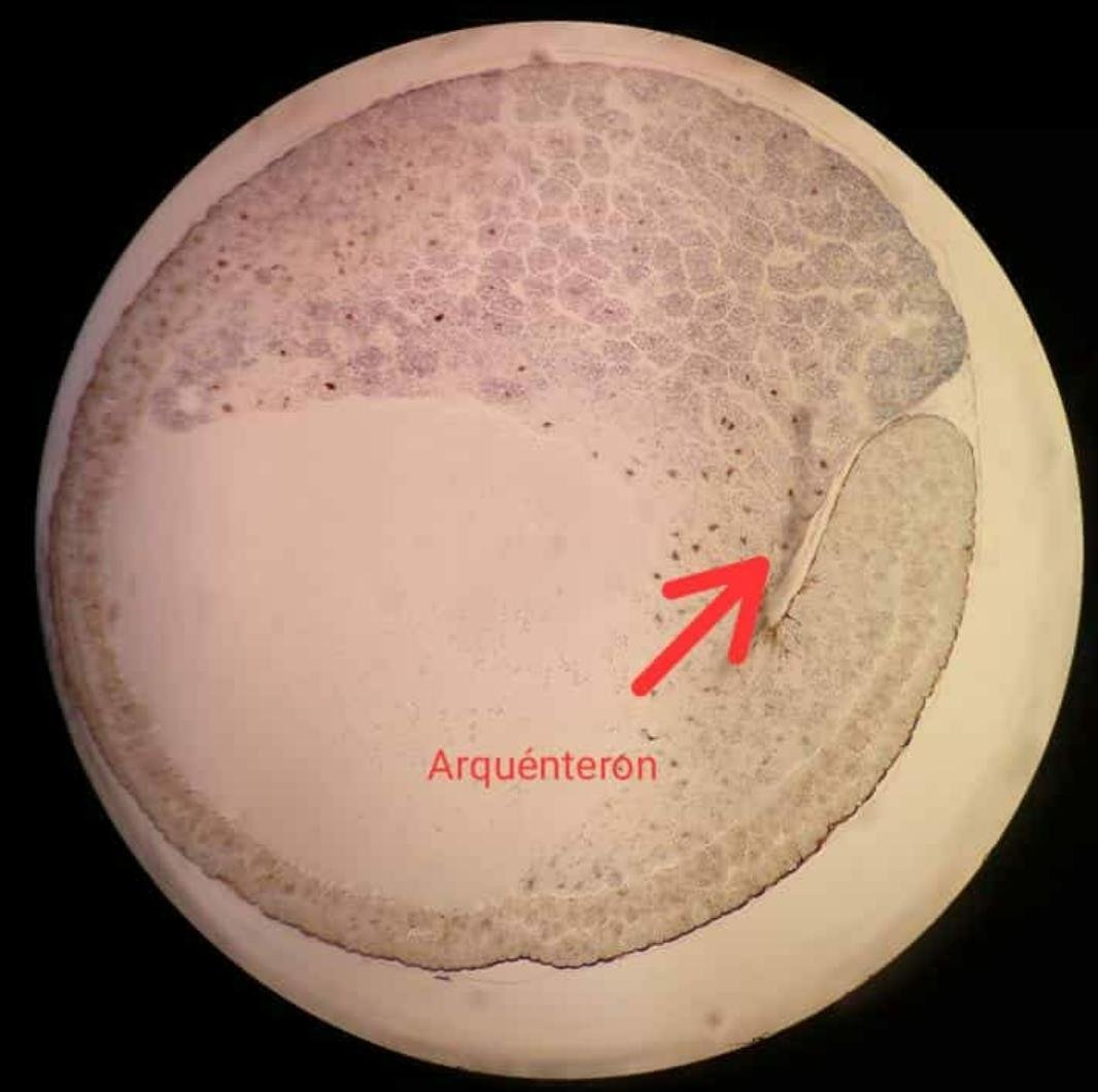 Una gástrula temprana con el arquénteron, cavidad embrionaria precursora del tubo digestivo que se comunica con el exterior por el blastoporo, señalado